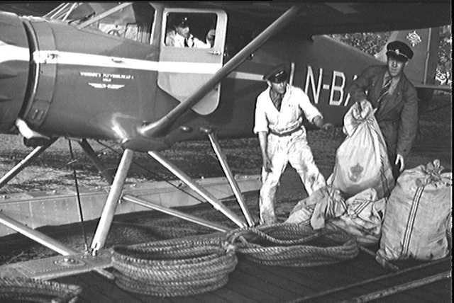 Widerøe's Flyveselskap LN-BAR Stinson SR.8 or SR.9 Reliant at Oslo (uncertain)